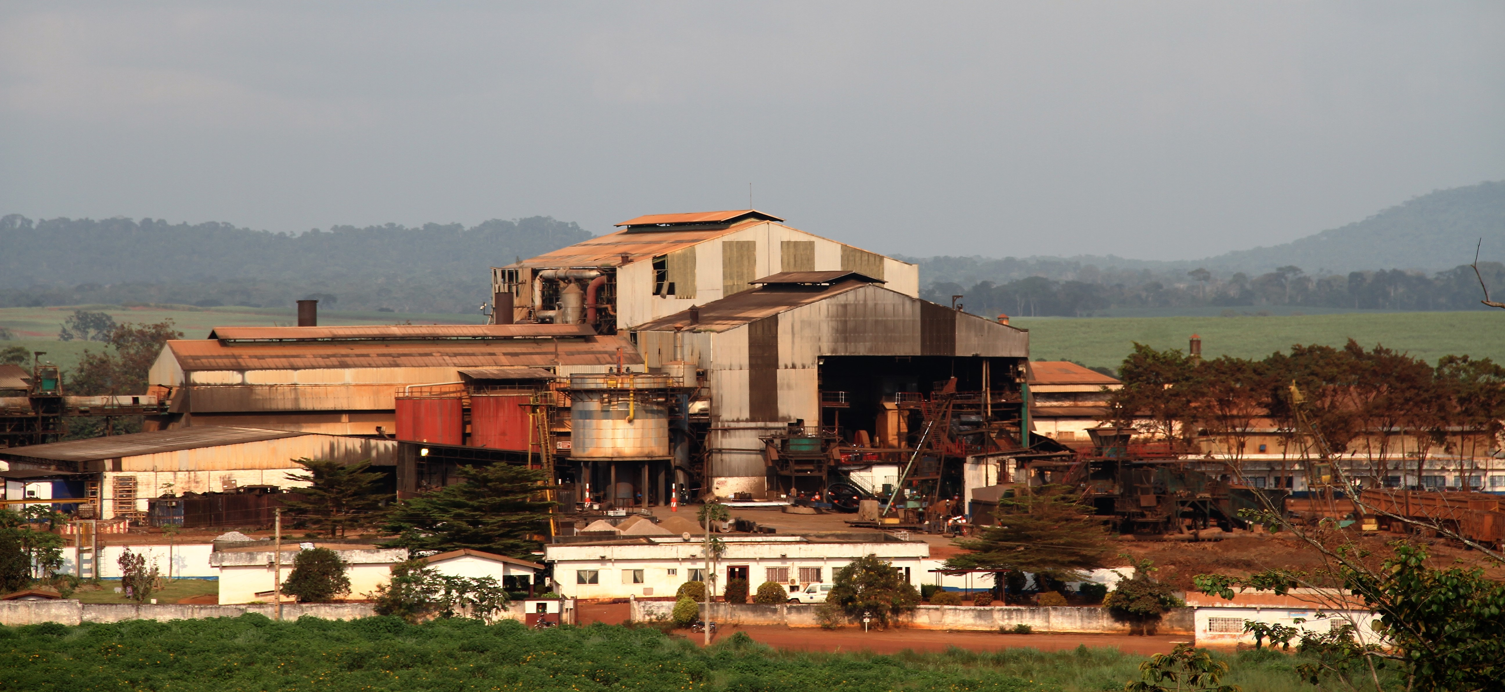 SOSUCAM Nkoteng